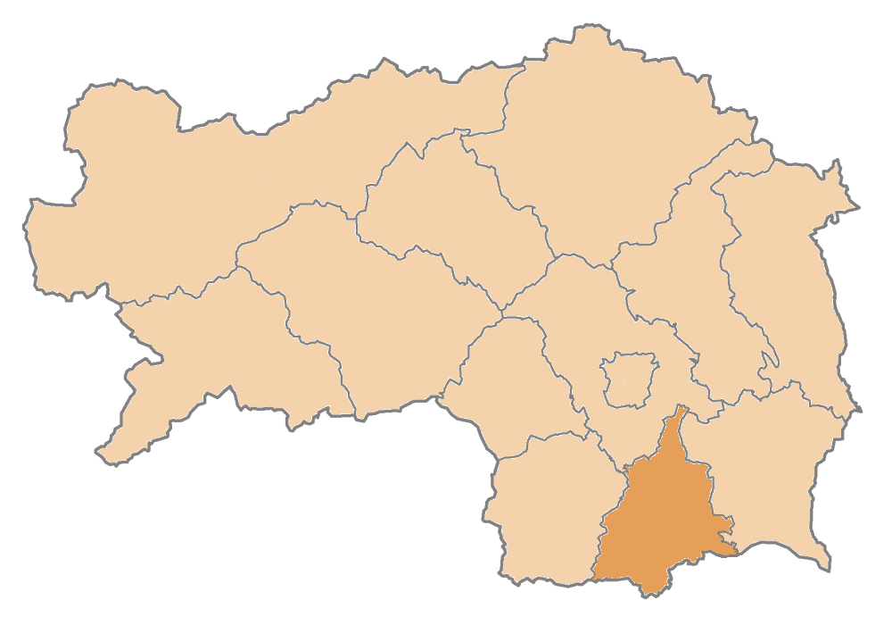 Karte: politischer Bezirk Leibnitz Lizenz: GNU FDL Quelle: Zeichnung plp Datum: de:2004 Ort: Wien